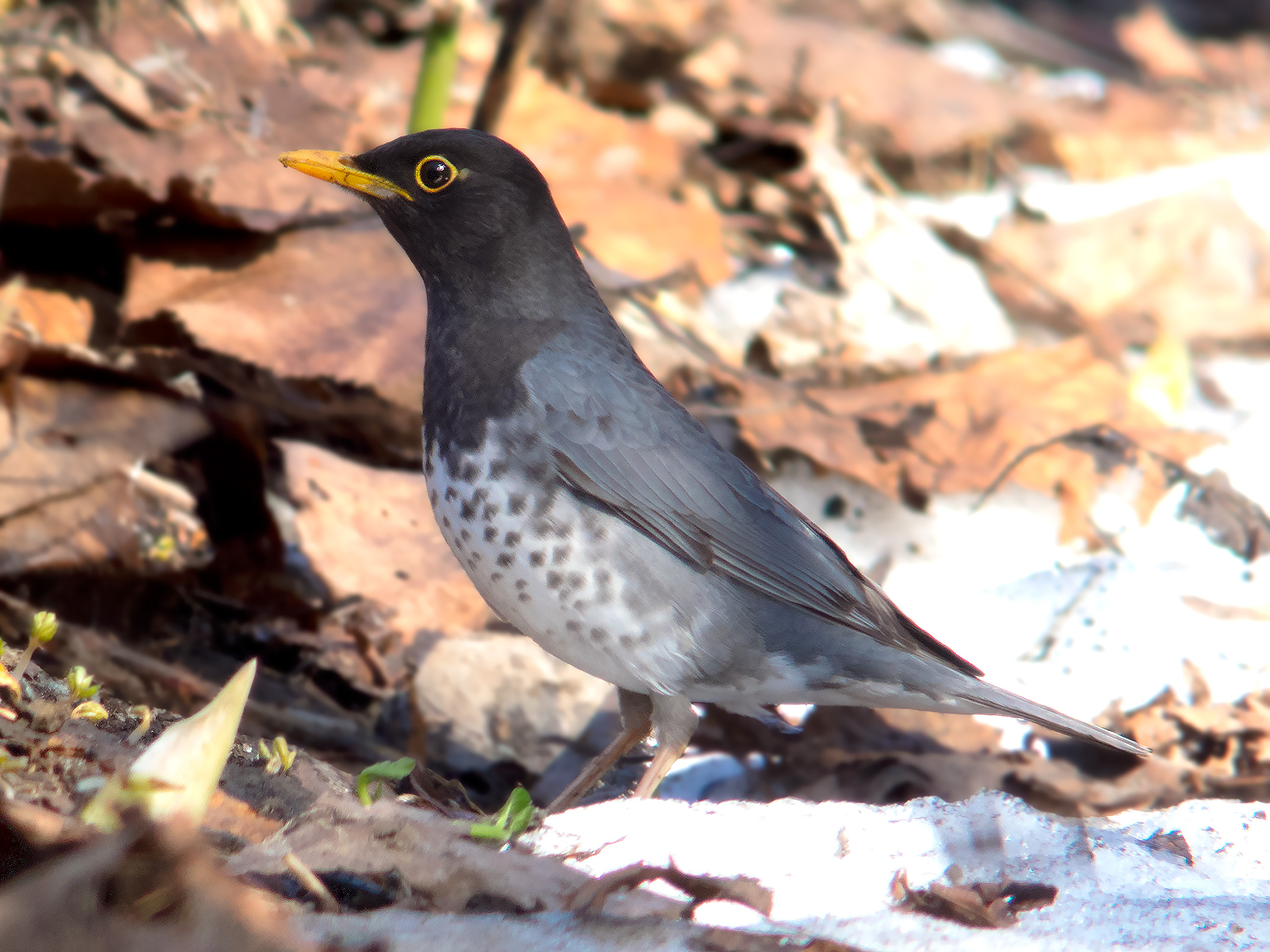 クロツグミ 撮影地 北海道